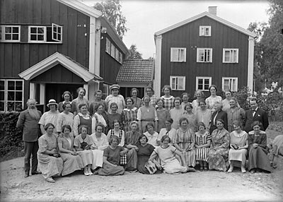 Elever från någon kurs på Brunnsviks Folkhögskola uppställda utanför gamla matsalen. I bakgrunden syns gaveln på "Röda Nästet".